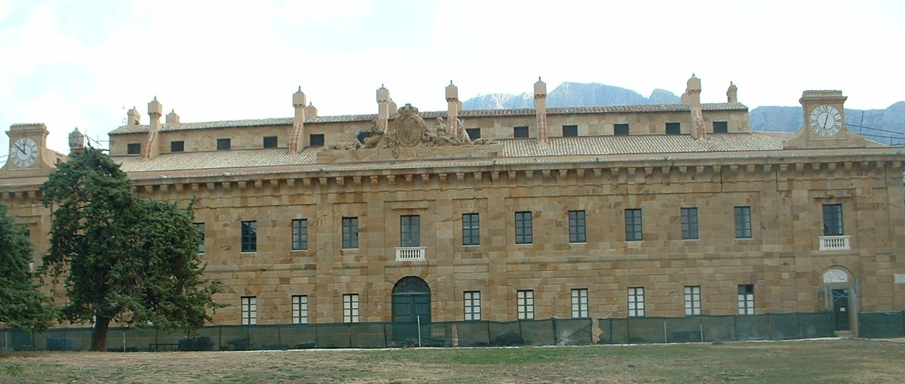 Ficuzza (fraz. Corleone), Palazzina di caccia, opera di Giuseppe Venanzio Marvuglia (Palermo, 1729 – 1814).